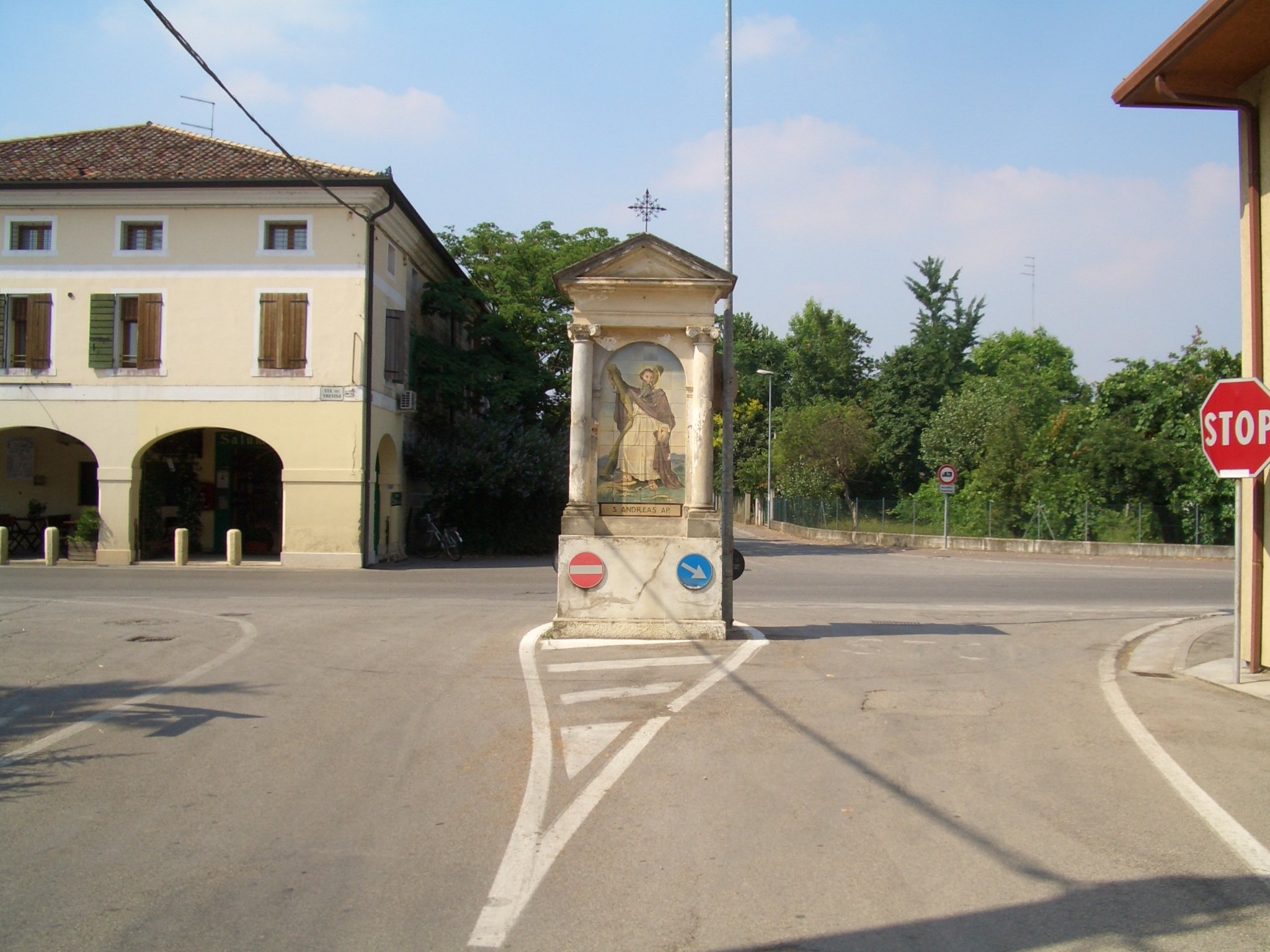 Immagine di uno degli incroci di Cavasagra. Questo incrocio è vicino a Villa Corner